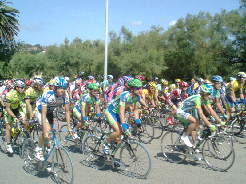 Group of cyclists of La Vuelta a España in Santander, Cantabria (Spain) Grupo de ciclistas de La Vuelta a España en Santander, Cantabria (España) Autor:xuankar